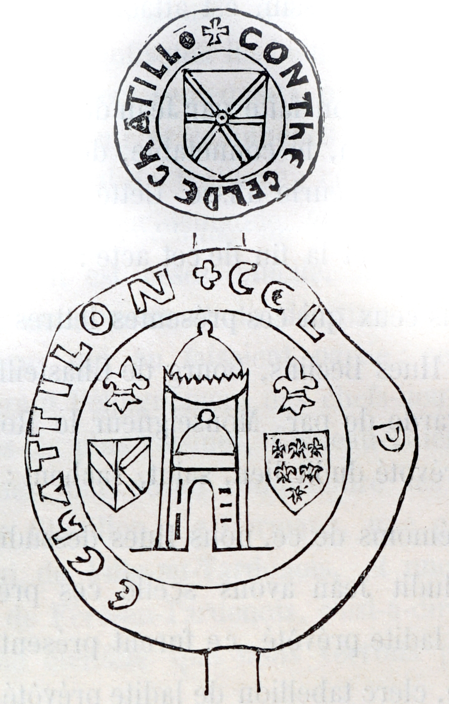 sceau de Gautier V de 1315.